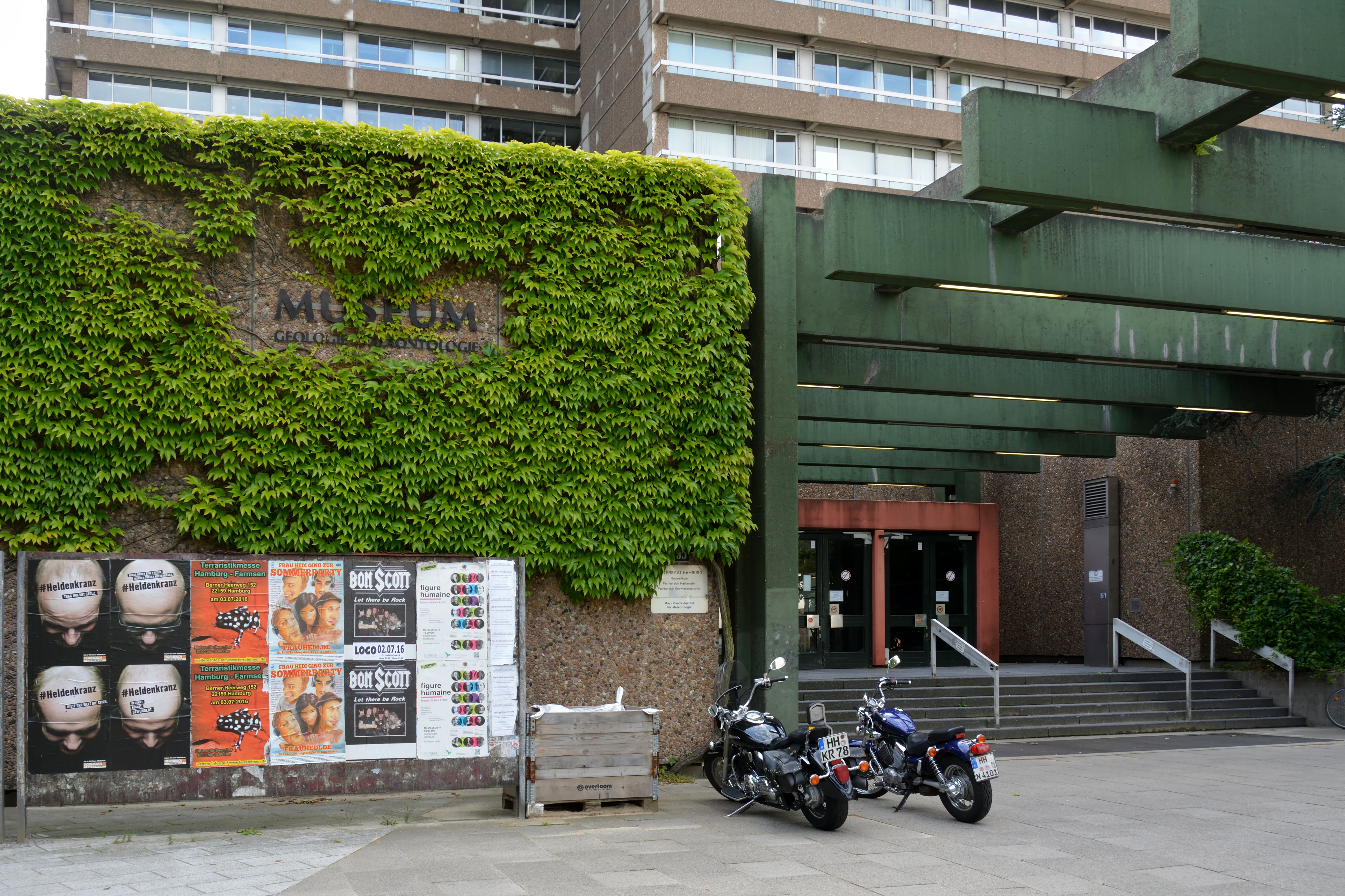 Impressionen aus dem "Geologisch-Paläontologisches Museum Hamburg"